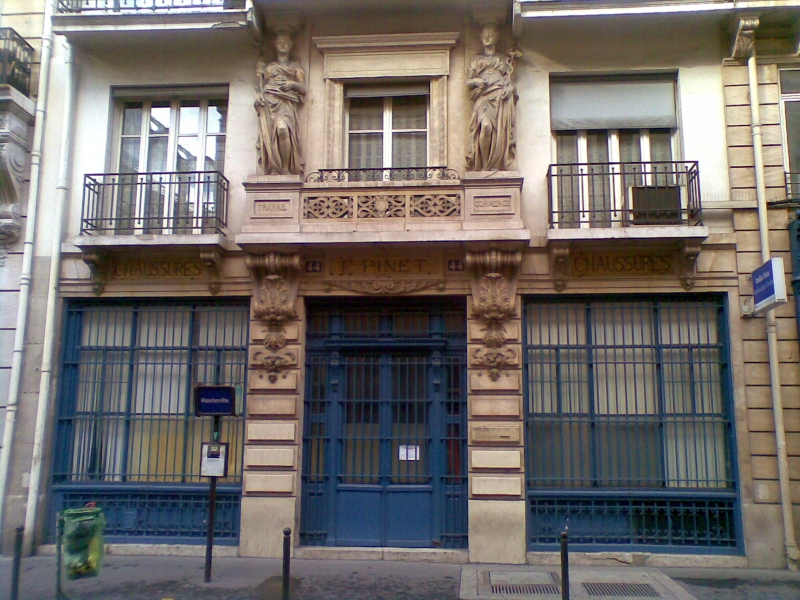 Anciens établissements Pinet, 44 rue de Paradis, Paris 10e